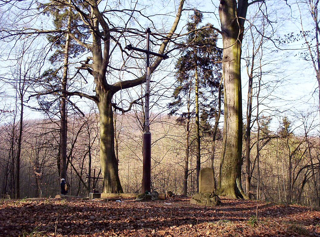 Puszcza Bukowa - cmentarz rodziny Jaeckel